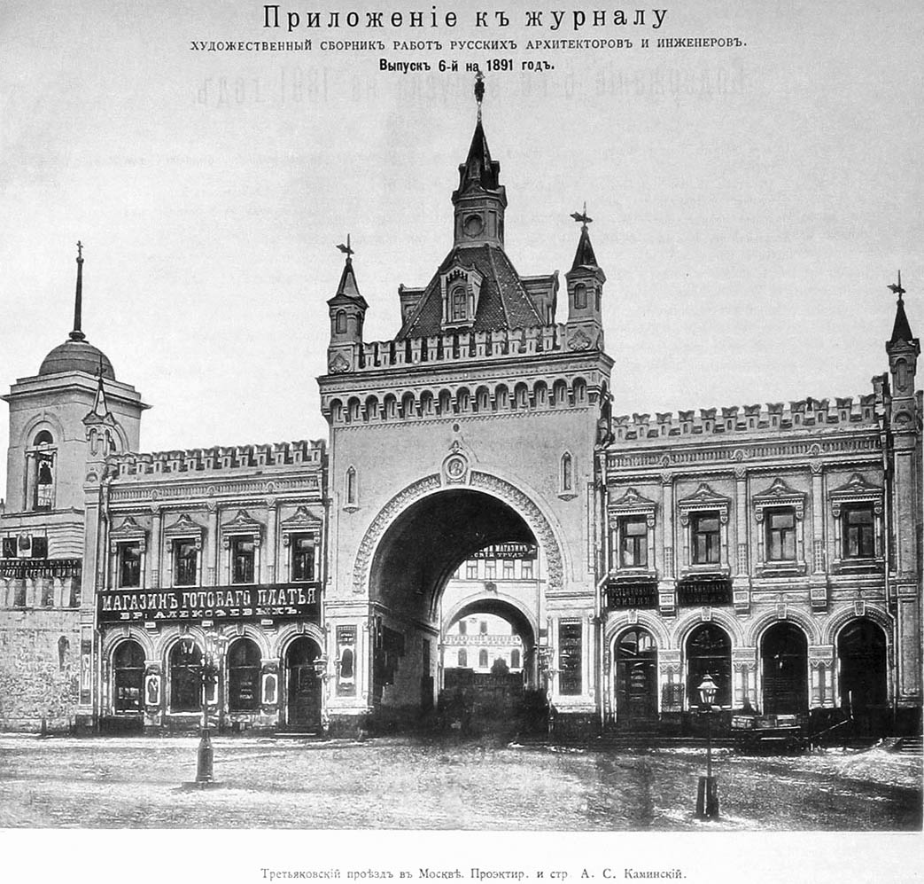 Tretyakovsky Proyezd arch, Moscow